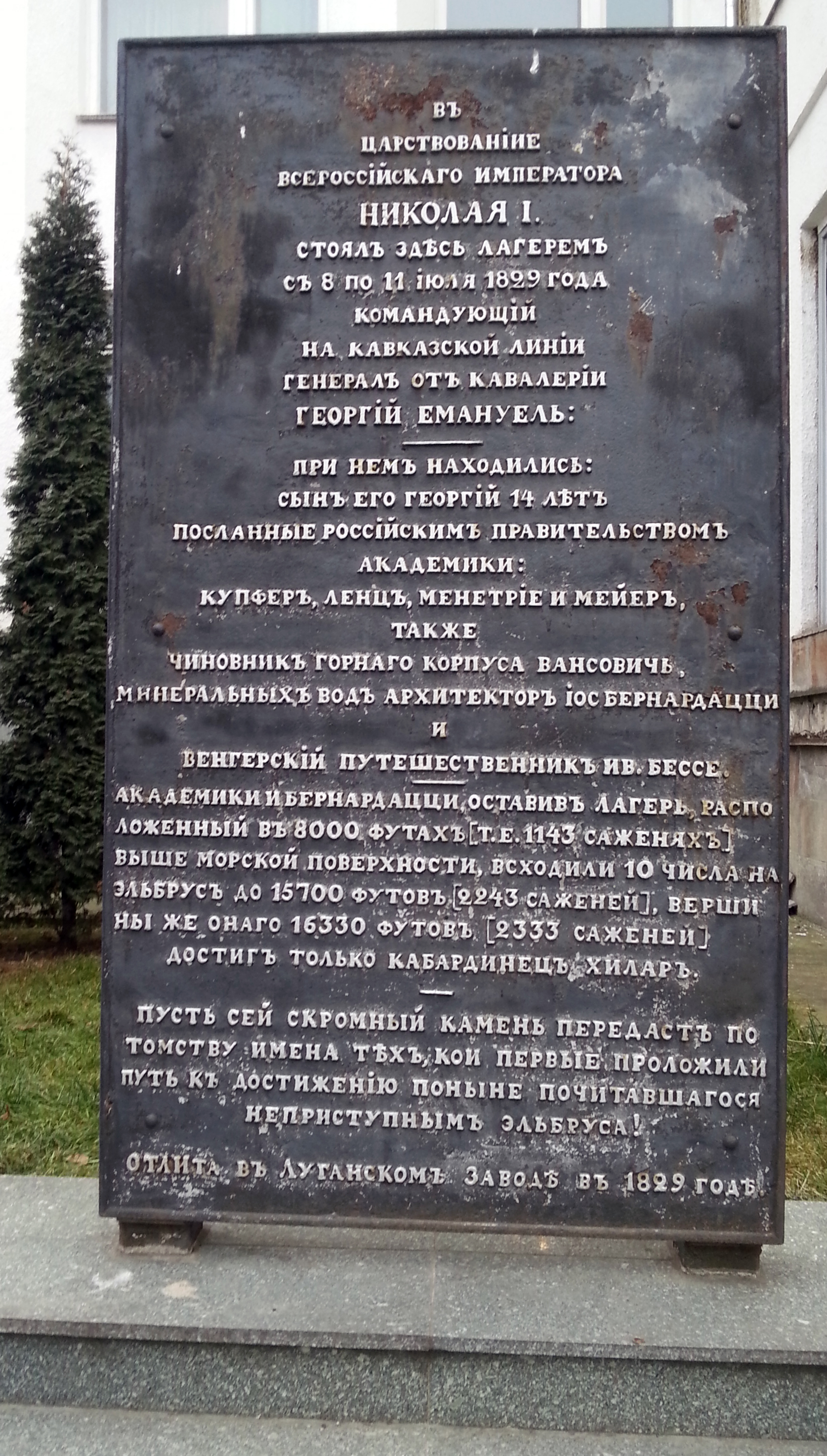 Памятная плита, отлитая на Луганском заводе в 1828 г. Гор. Нальчик. Вторая плита на арабском языке установлена в Пятигорске.